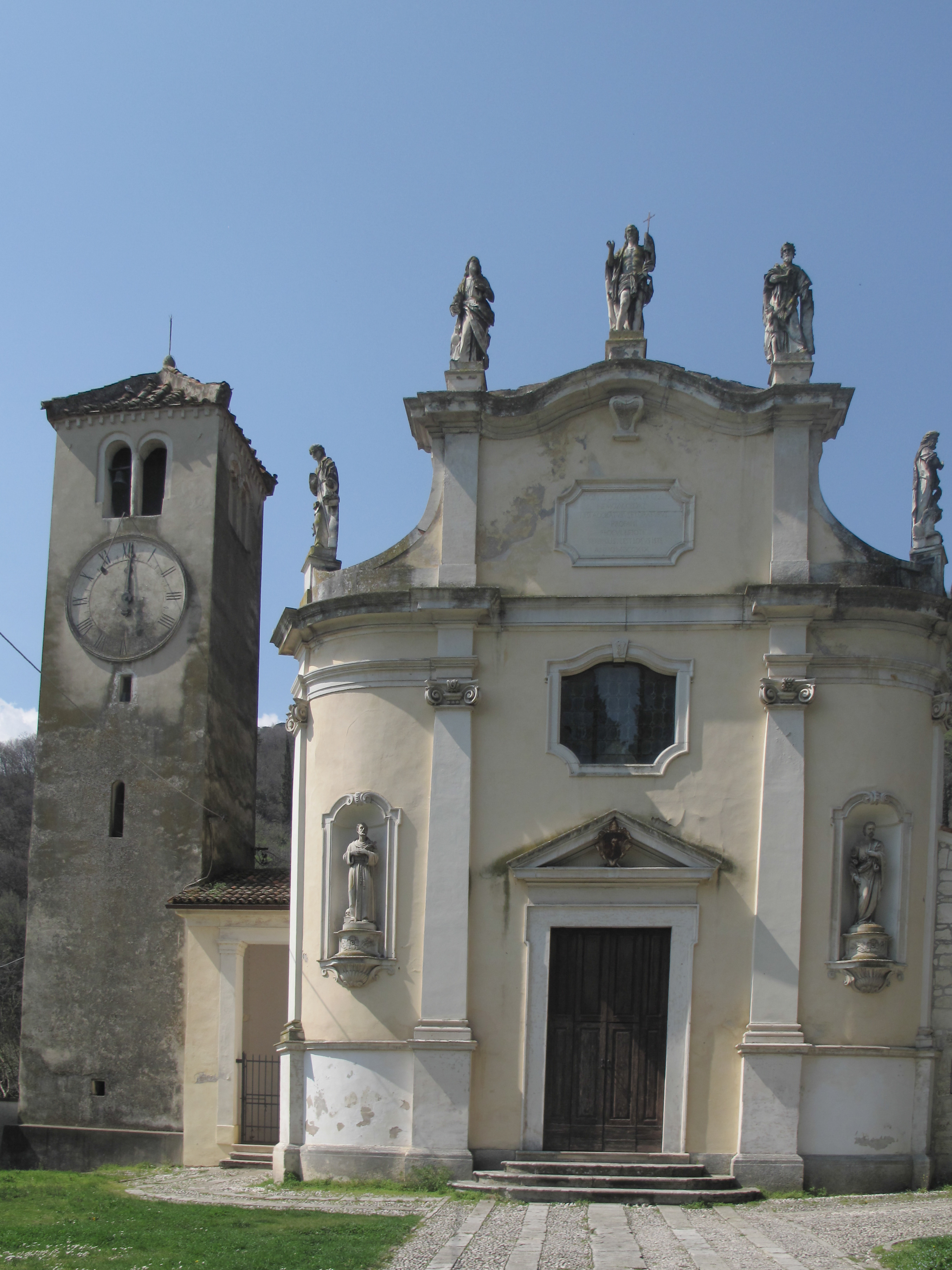 Costozza di Longare - Pieve S.Maur